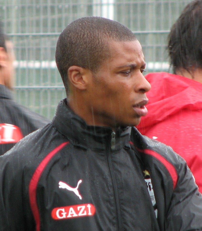 Johan Audel beim VfB Training bei strömendem Regen. Aufgenommen von vfb-exklusiv.de